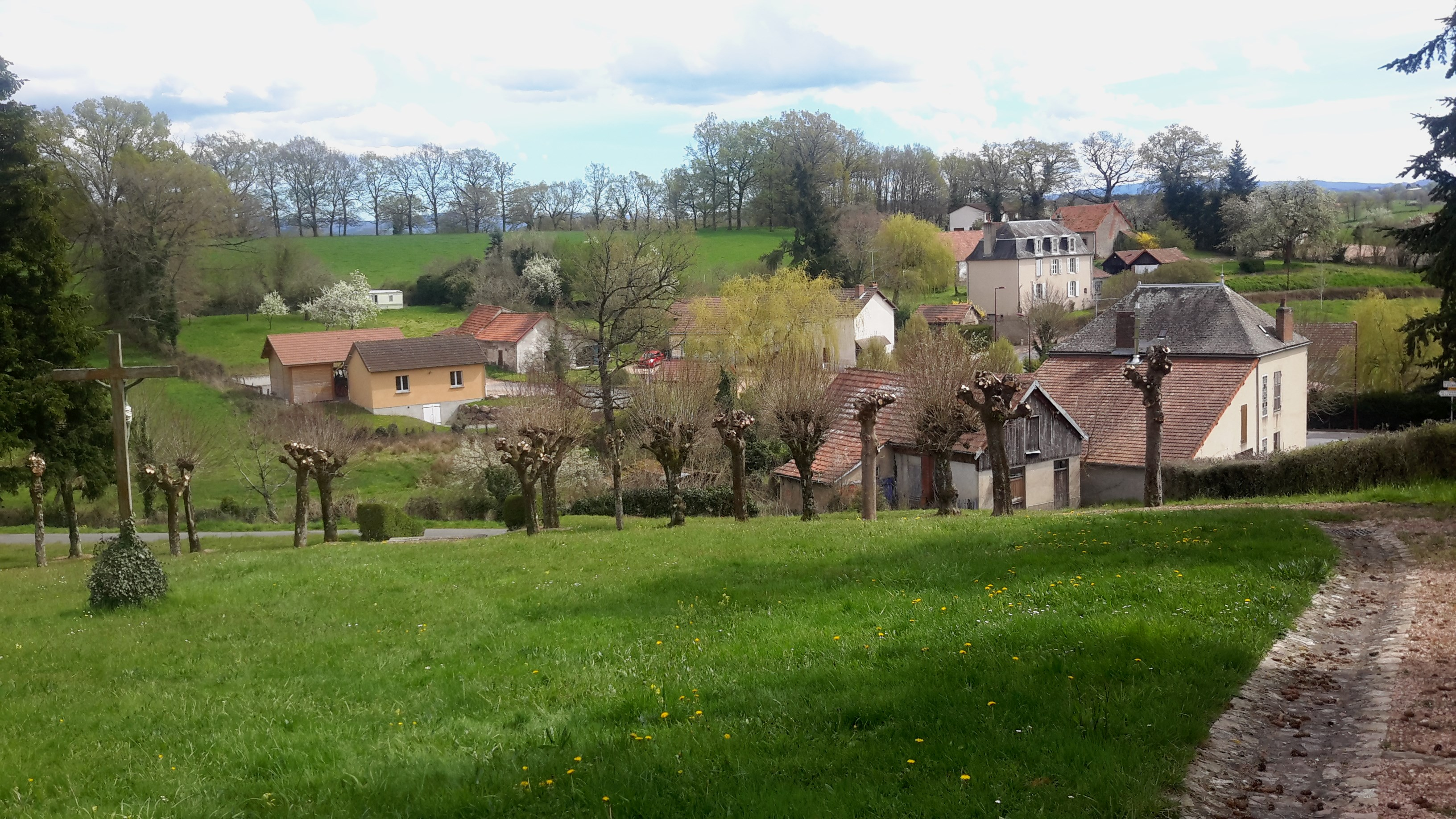 Vue générale de Saint-Christophe (Allier), France.